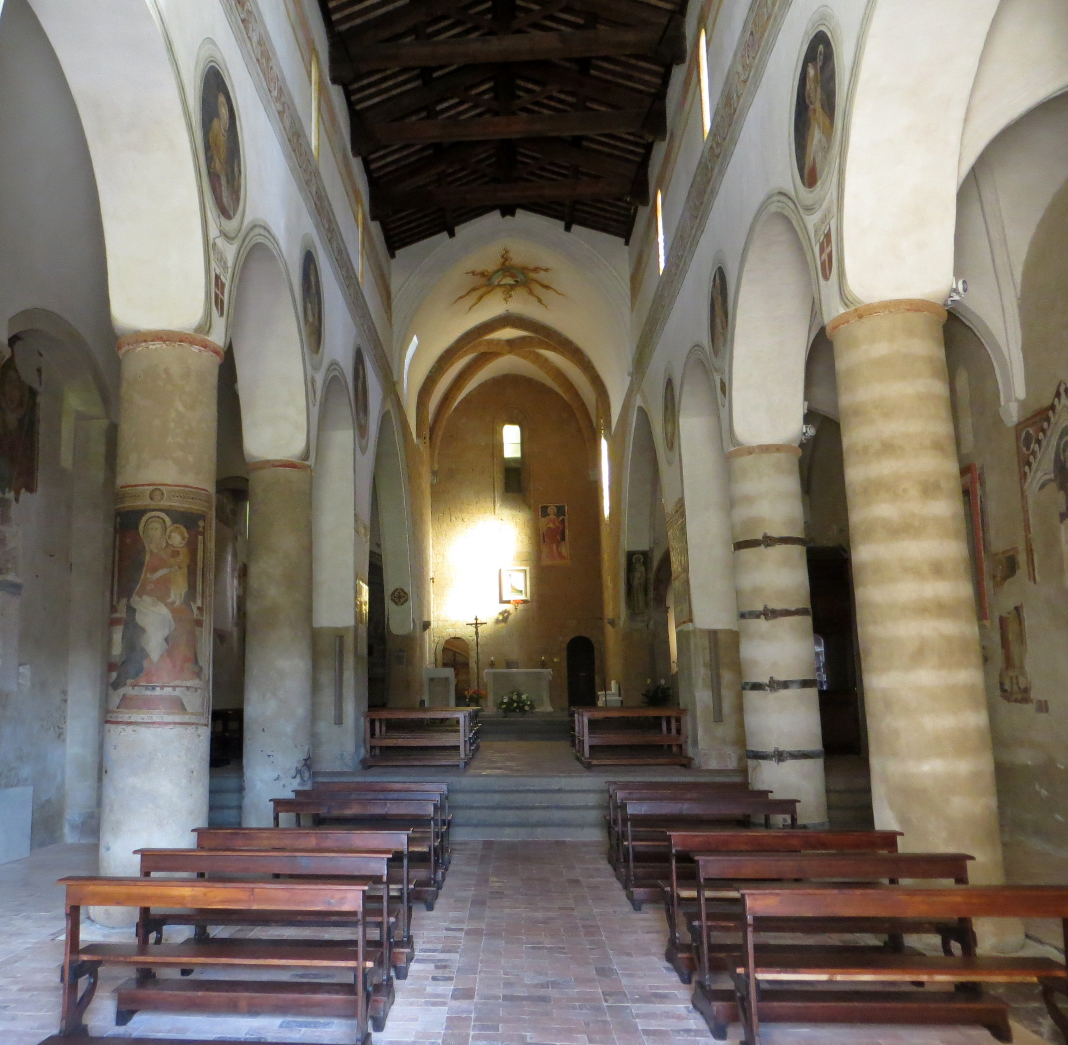 Chiesa di San Giovenale interno a Orvieto